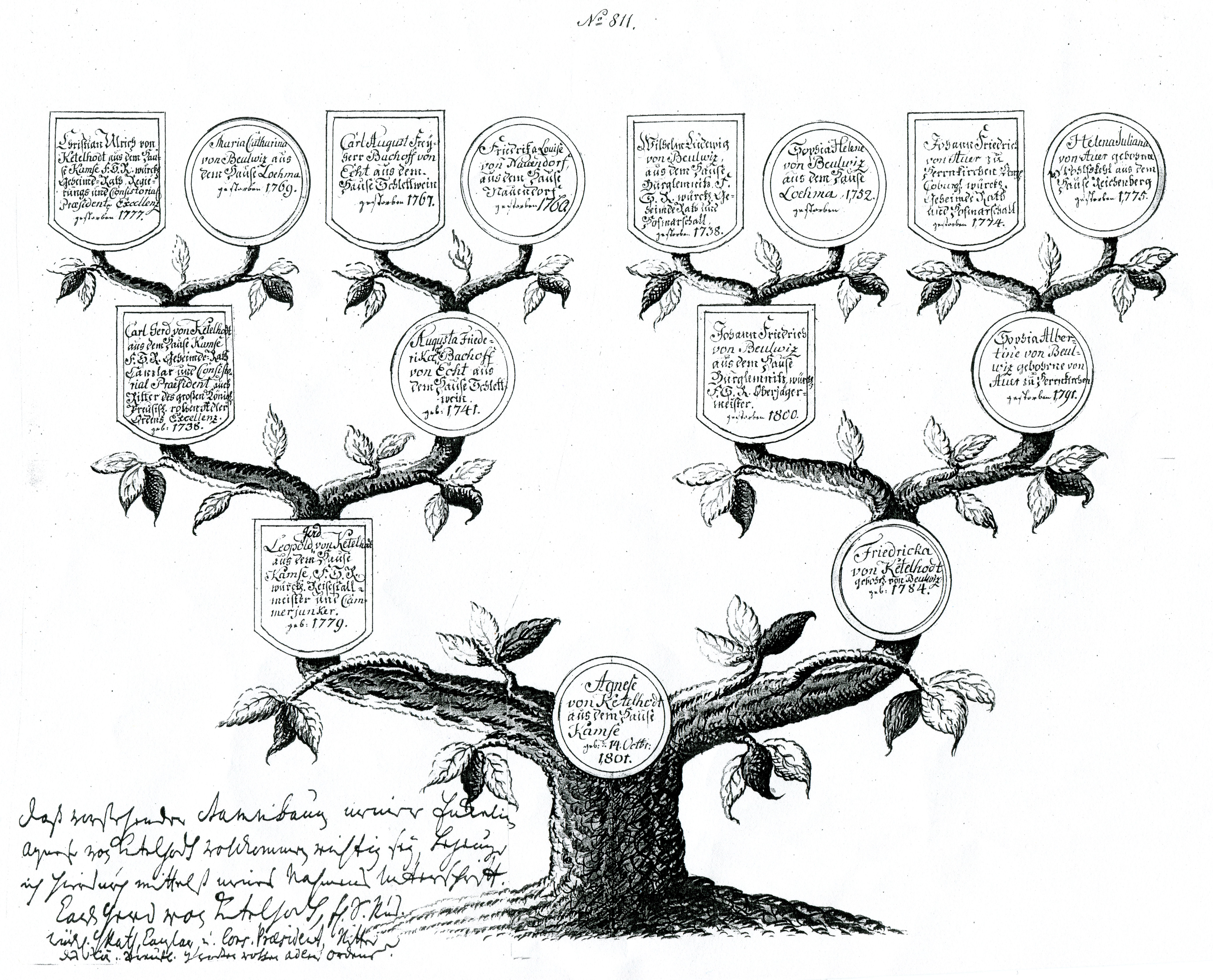 Ahnentafel von Agnete von Ketelhodt, eingereicht beim Kloster Dobbertin